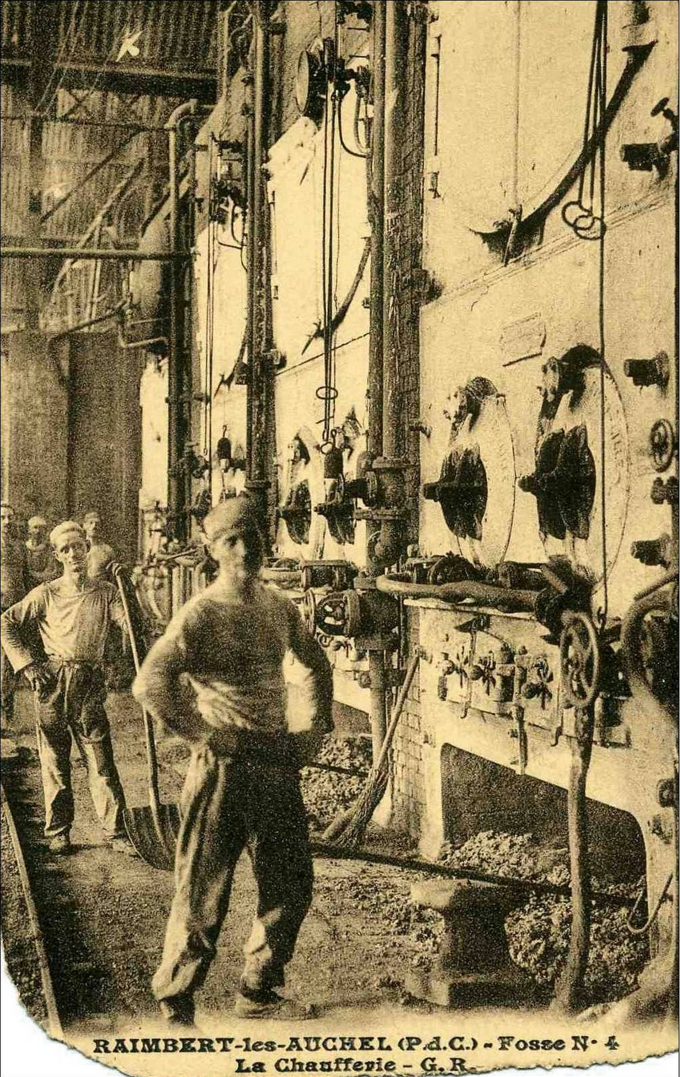 La Fosse n° 4 - 4 bis de la Compagnie des mines de Marles était un charbonnage constitué de deux puits situé à Auchel, Pas-de-Calais, Nord-Pas-de-Calais, France.